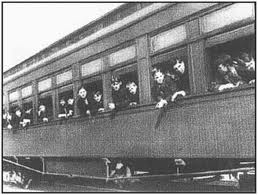 Train d'orphelins au XIXème siècle